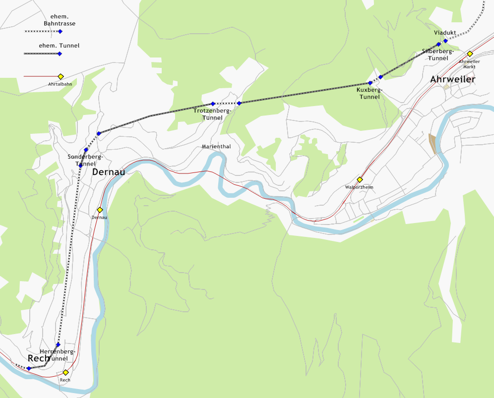 Strategischer Bahndamm, Strecke zwischen Ahrweiler und Rech. Hintergrundkarte: . Vermuteter Streckenverlauf und Lage der Tunnelportale: eigene Erhebung.